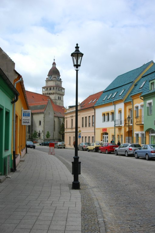 Kráľovská street, Skalica